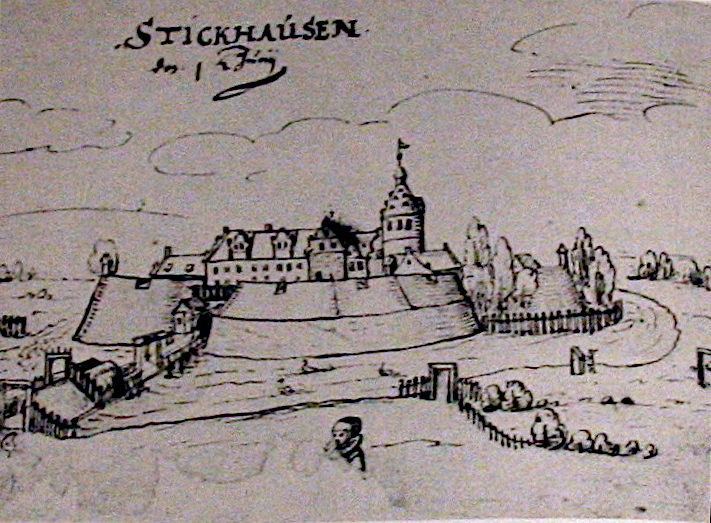 Burg Stickhausen auf einer Zeichnung von Georg Faber aus dem Jahre 1632